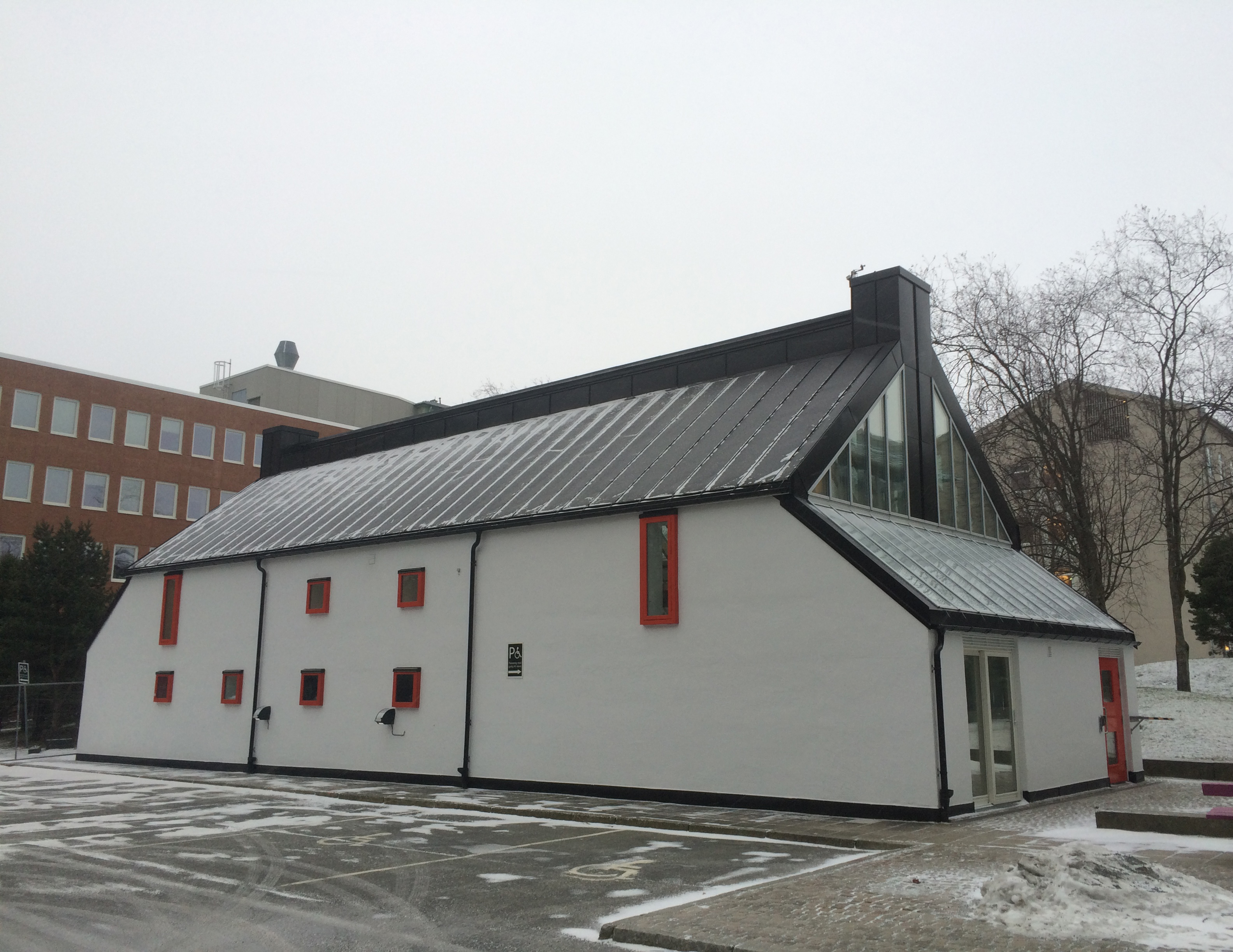 Skiboli, bygning på NTNU Gløshaugen, sett fra nordvest.